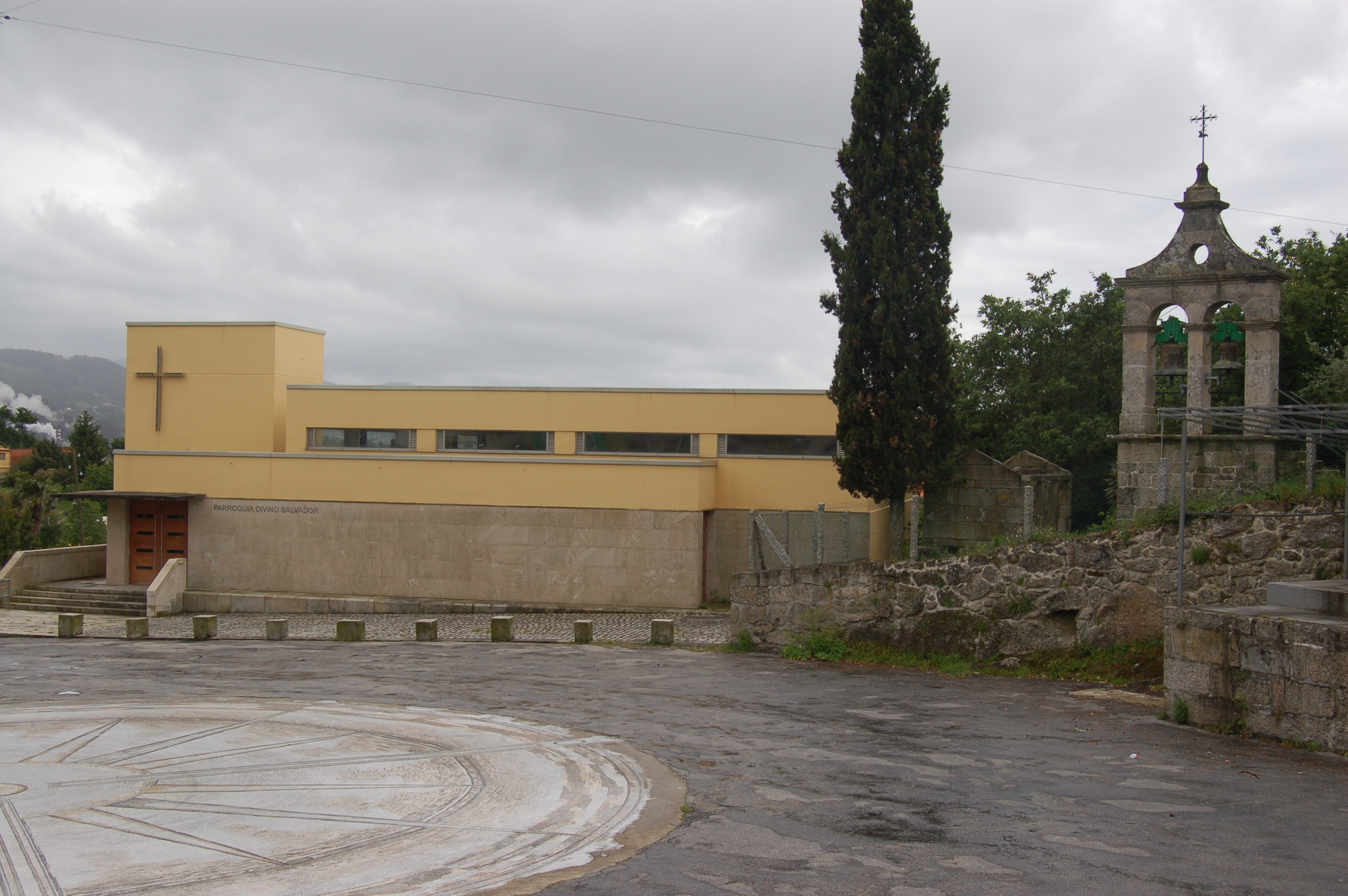 Igrexa parroquial de San Salvador de Poio (Poio)